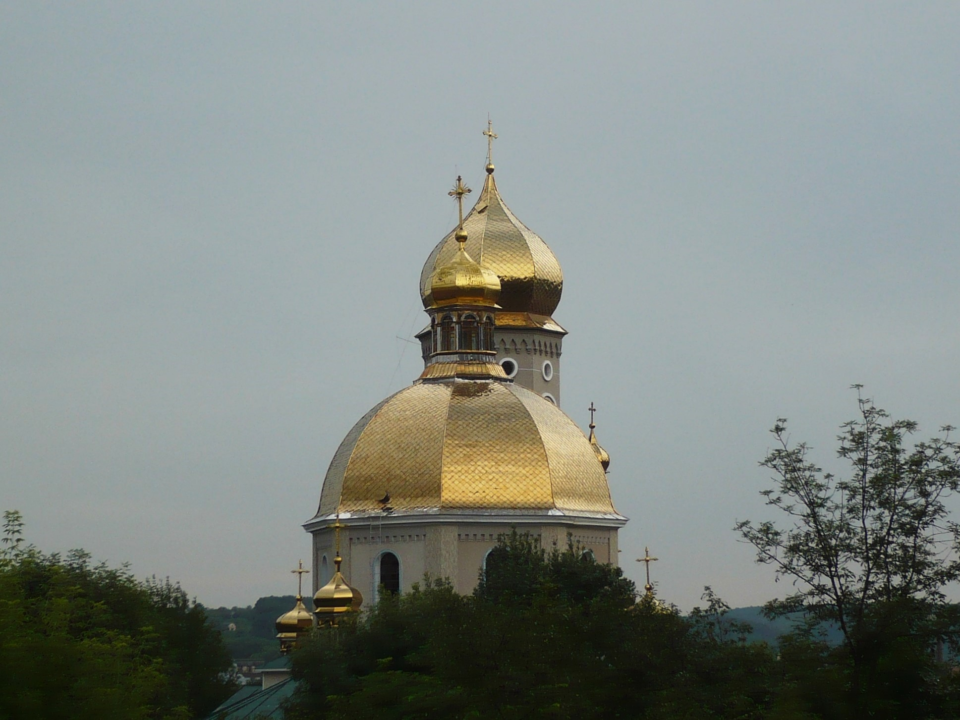 Czortków. Cerkiew Zaśnięcia